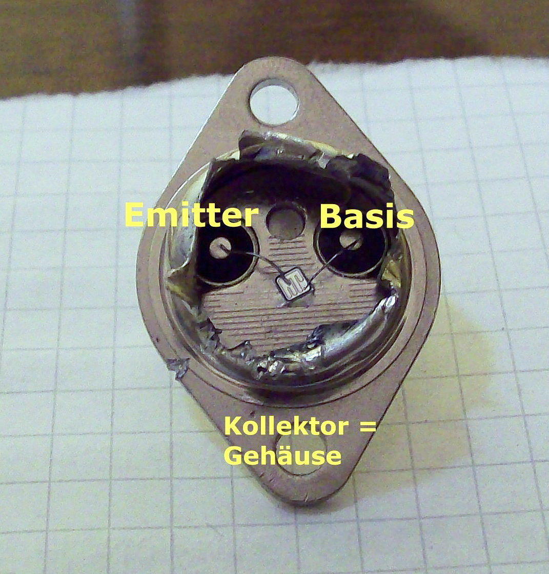 Freigelegter Transistorchip eines 2N3055ers. Bipolarer NPN-Transistor, 15A, 60V, Hersteller: ST, Kaufdatum: 2007